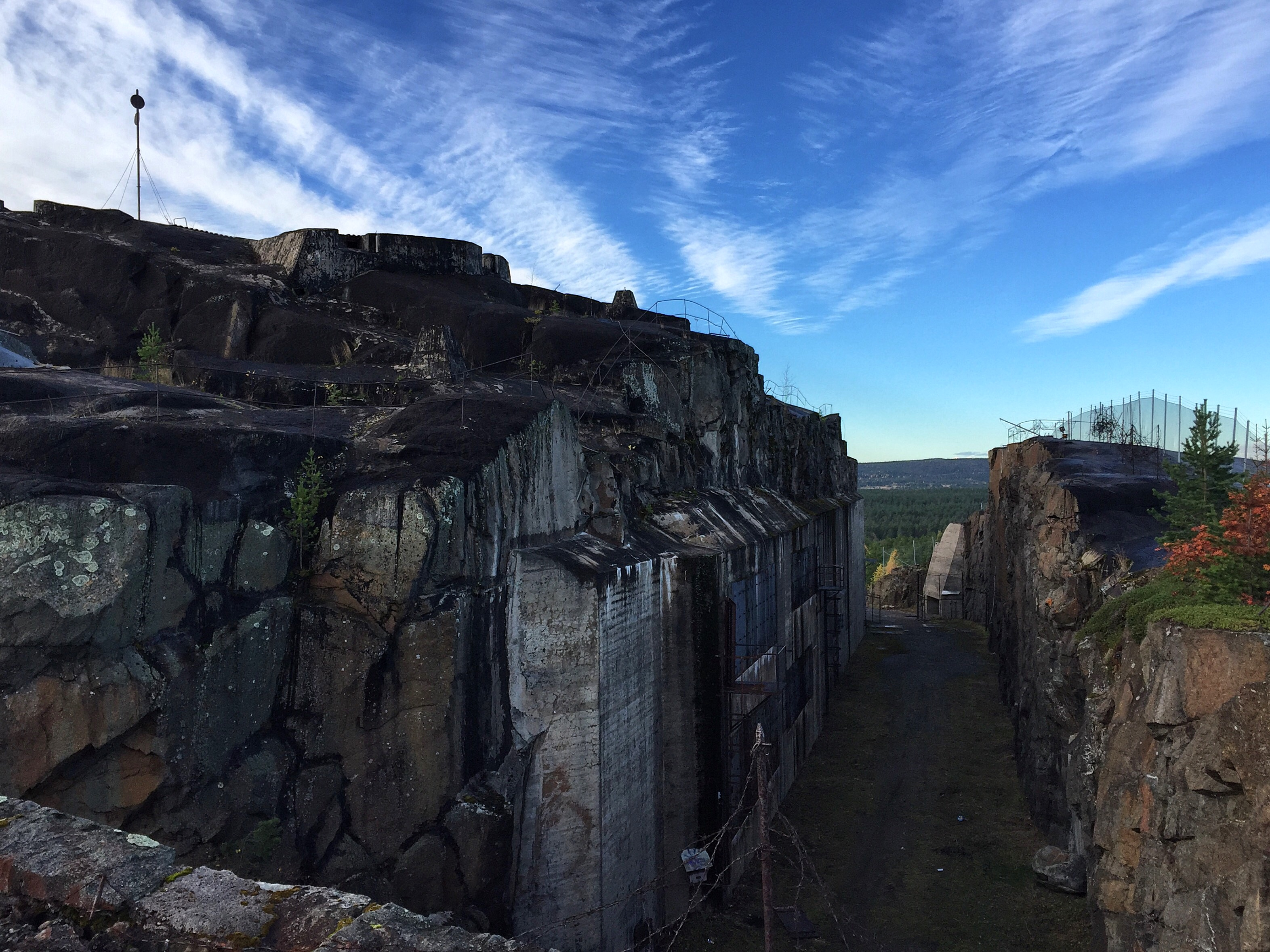 Södra Åbergsfortet är en del av Bodens fästning och stod färdig 1908. Besättningen utgjordes av drygt 500 man. Fortet var byggt så att det skulle klara en längre belägring. Här fanns logement och mässar, eget kraftverk, en djupborrad brunn och sjuksalar. Bestyckningen utgjordes av åtta kraftfulla kanoner med en kaliber på 84-120 millimeter och fyra kaponjärkanoner med 60 millimeters kaliber för närförsvar. Södra Åbergsfortet utgick som artilleribefästning 1992.